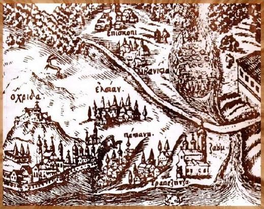 Охридско, гравюра на мед от Стематография